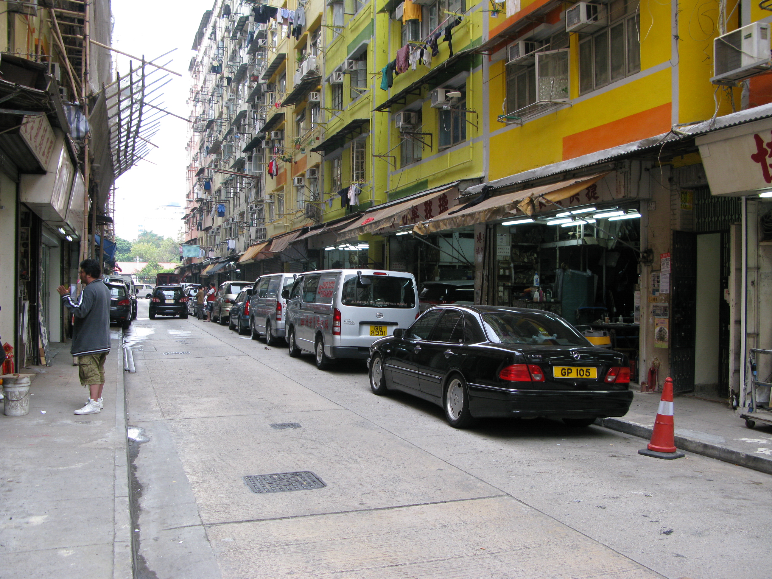 中文（香港）: 香港九龍土瓜灣鳳儀街